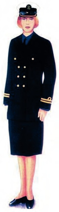 Ubiór wyjściowy funkcjonariuszy noszących umundurowanie MW z mundurem wyjściowym noszonym ze spódnicą z czapką garnizonową.